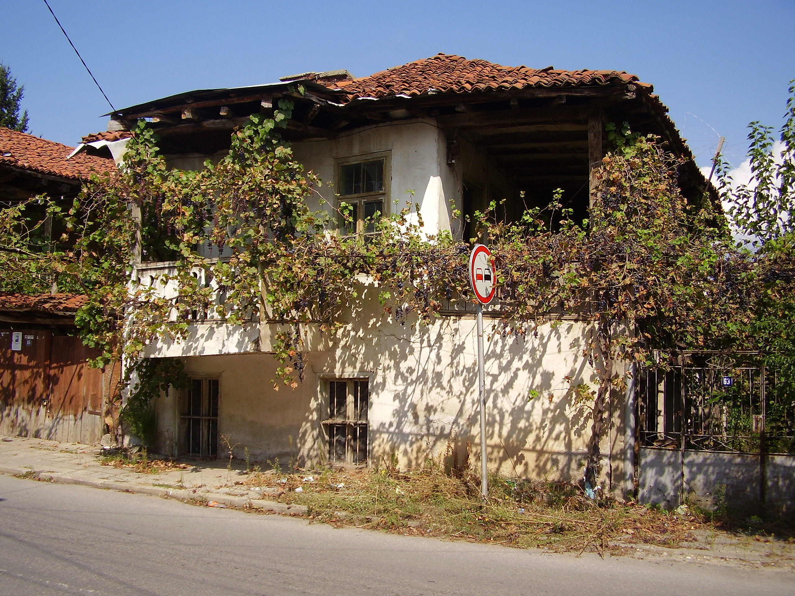 с.Соволяно